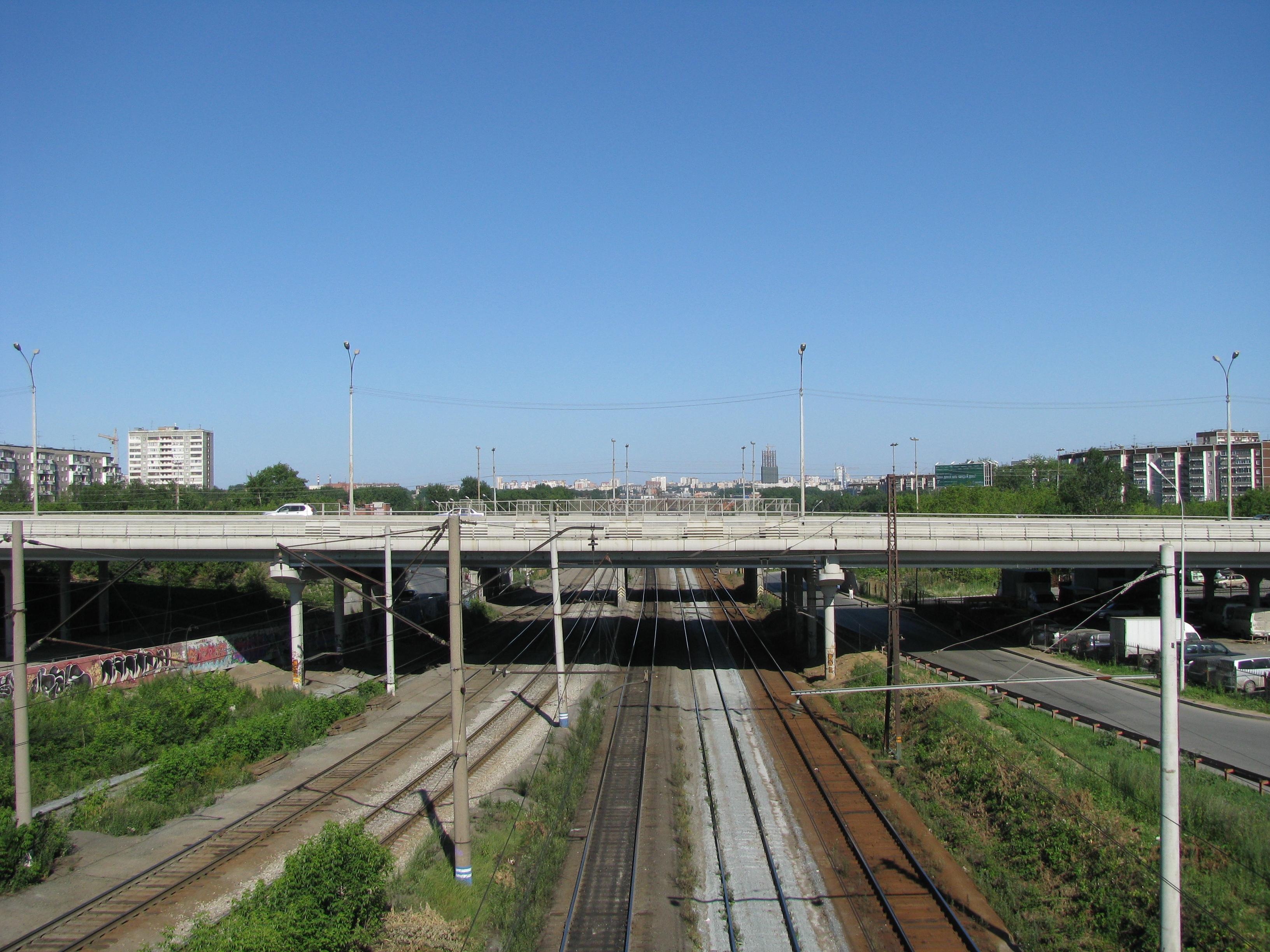 Транссиб в районе Екатеринбурга